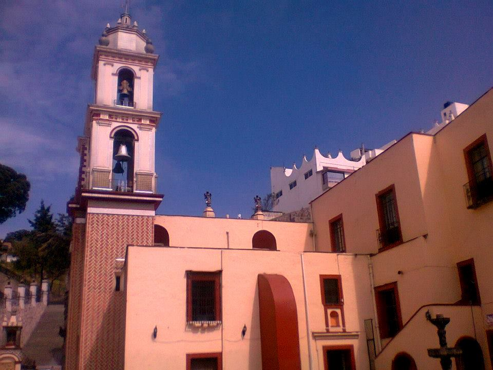 San Miguel del Milagro, Tlaxcala